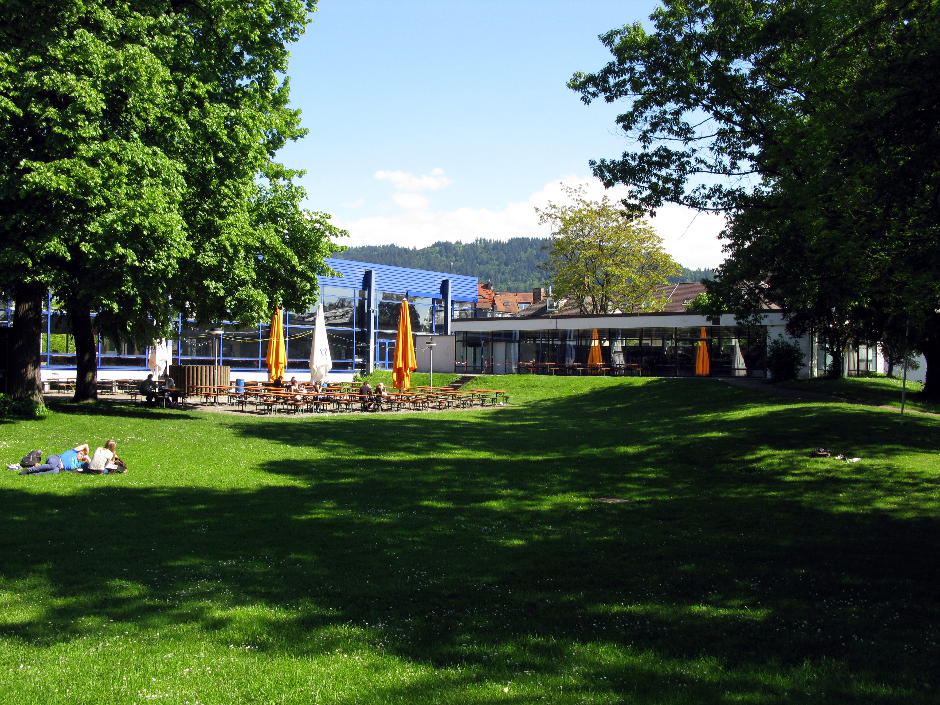 Alleegarten in Freiburg mit Mensa I der Uni